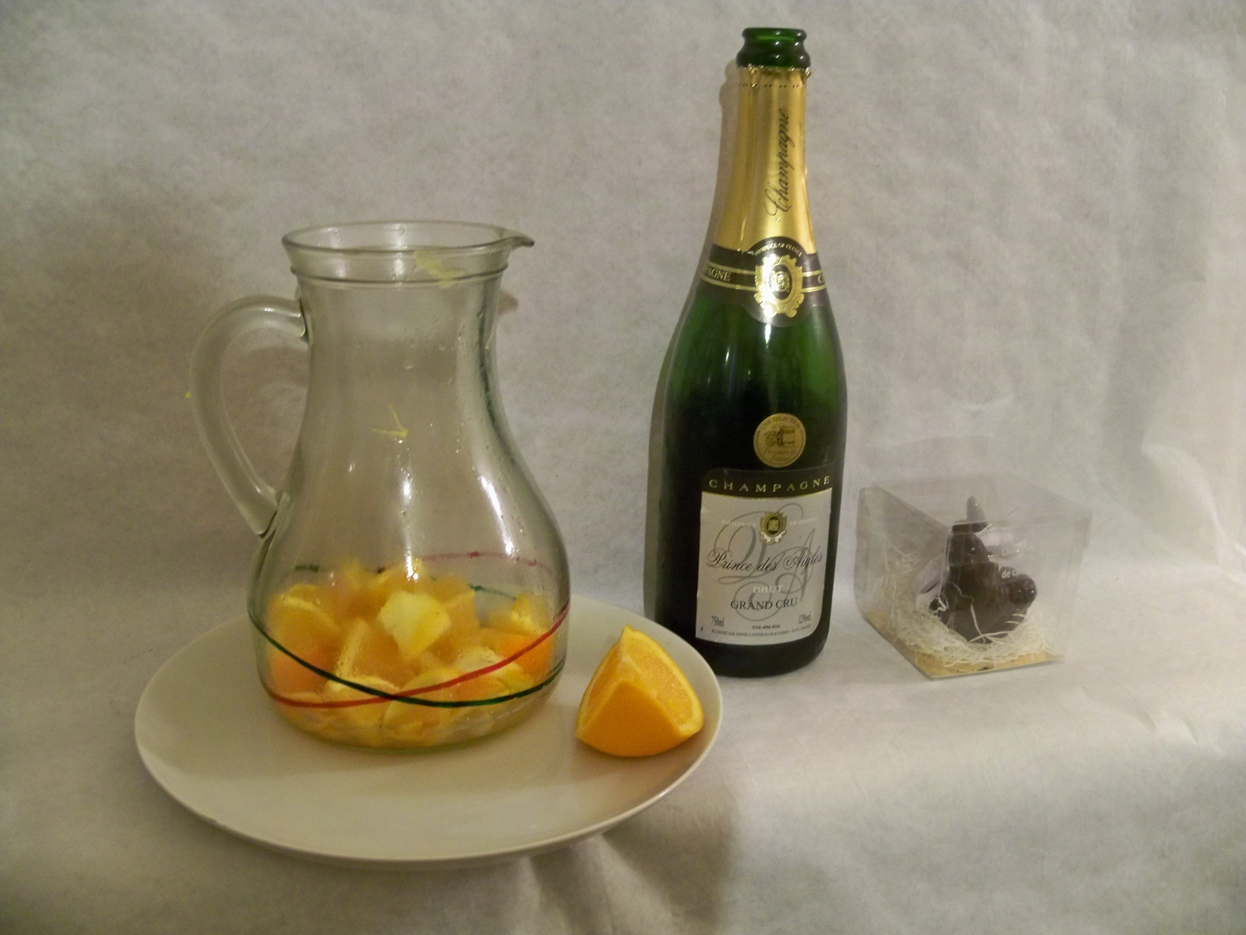 ingrédients de Marquisette, apéritif ardéchois